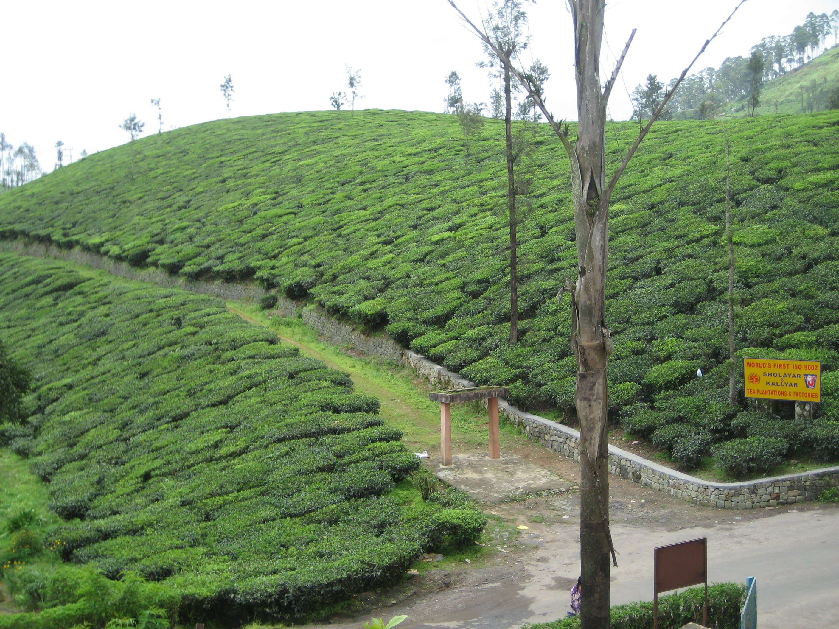 வால்பாறையில் உள்ள ஒரு தேயிலைத் தோட்டம்